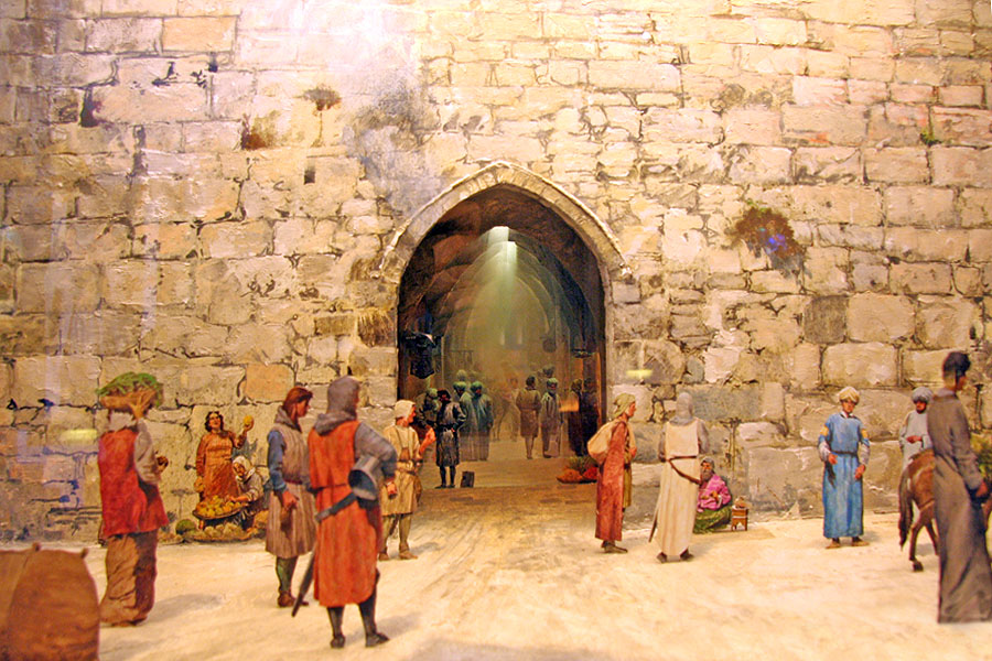 model of a Crusader market in David's Citadel museum, Jerusalem